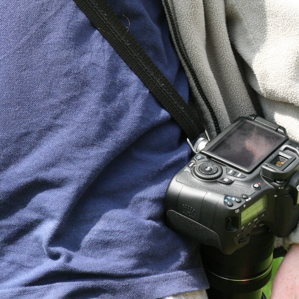 Canon 60D mit 18-135mm Objektiv an einem Sun Snipper Kameragurt